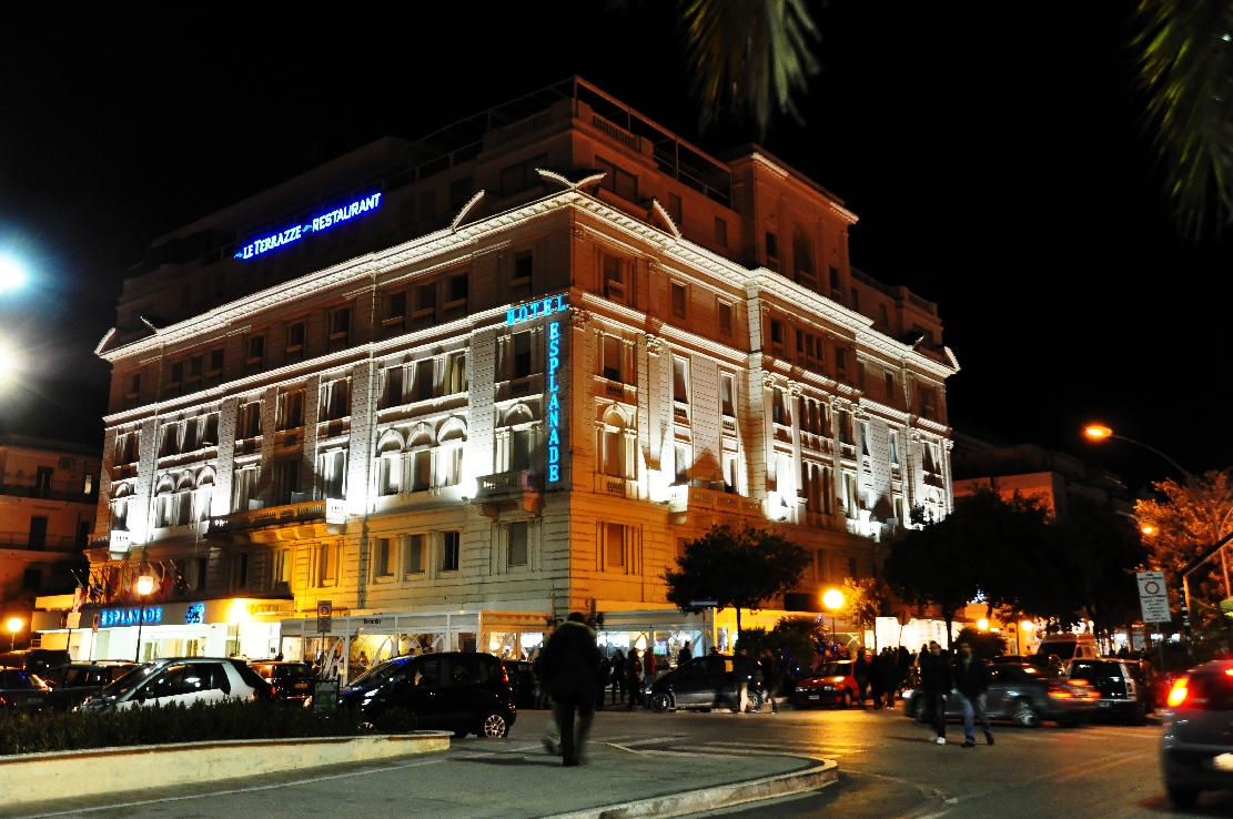 Pescara Centro